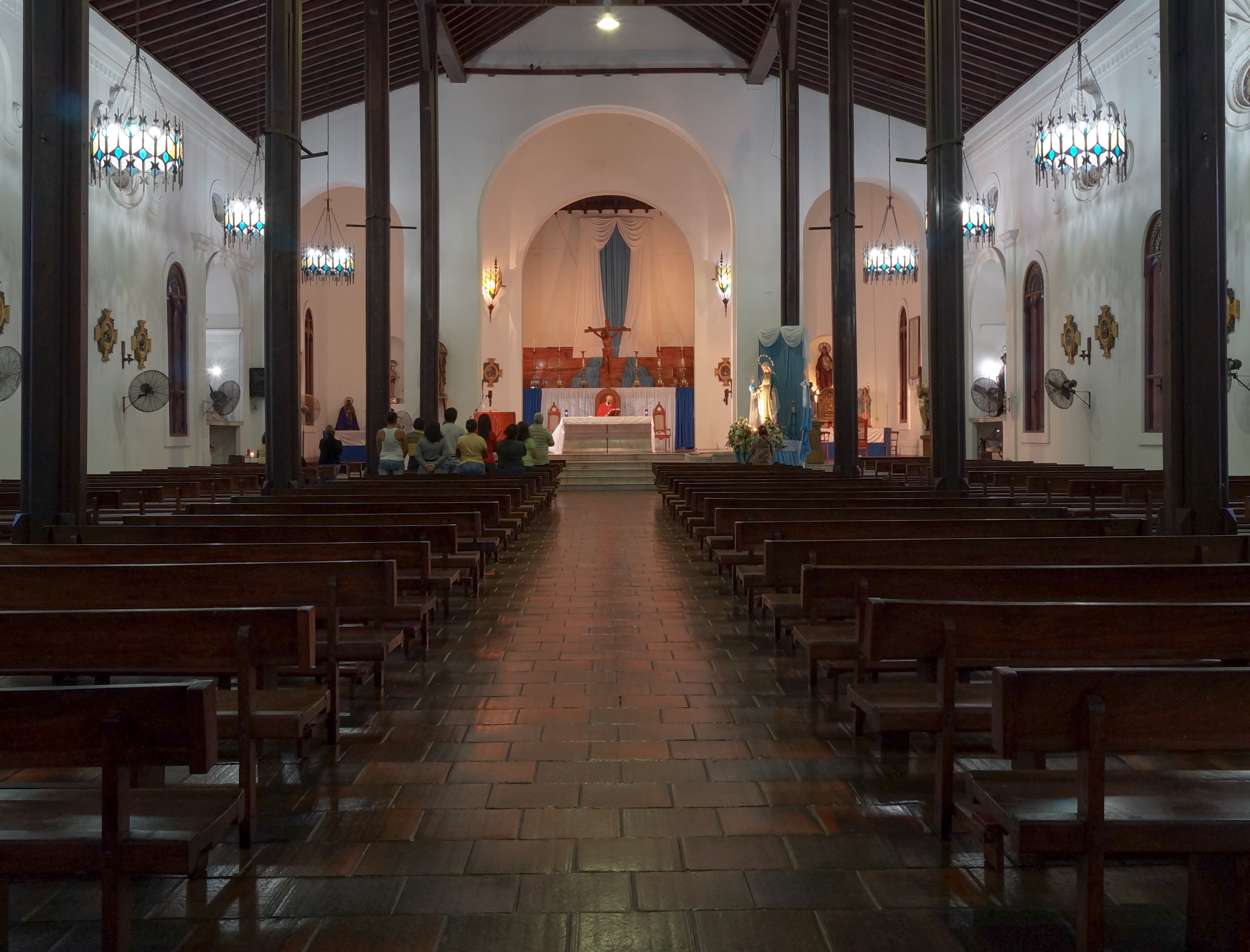 Nave central de la Catedral de Maracaibo